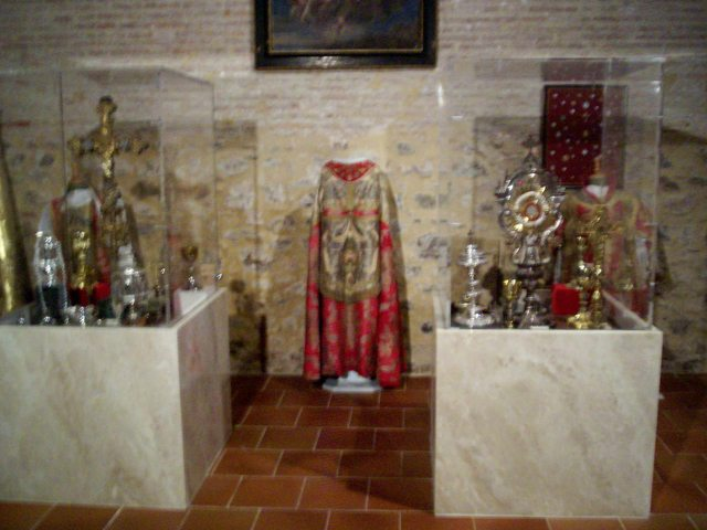 Museo de Villar de los Navarros